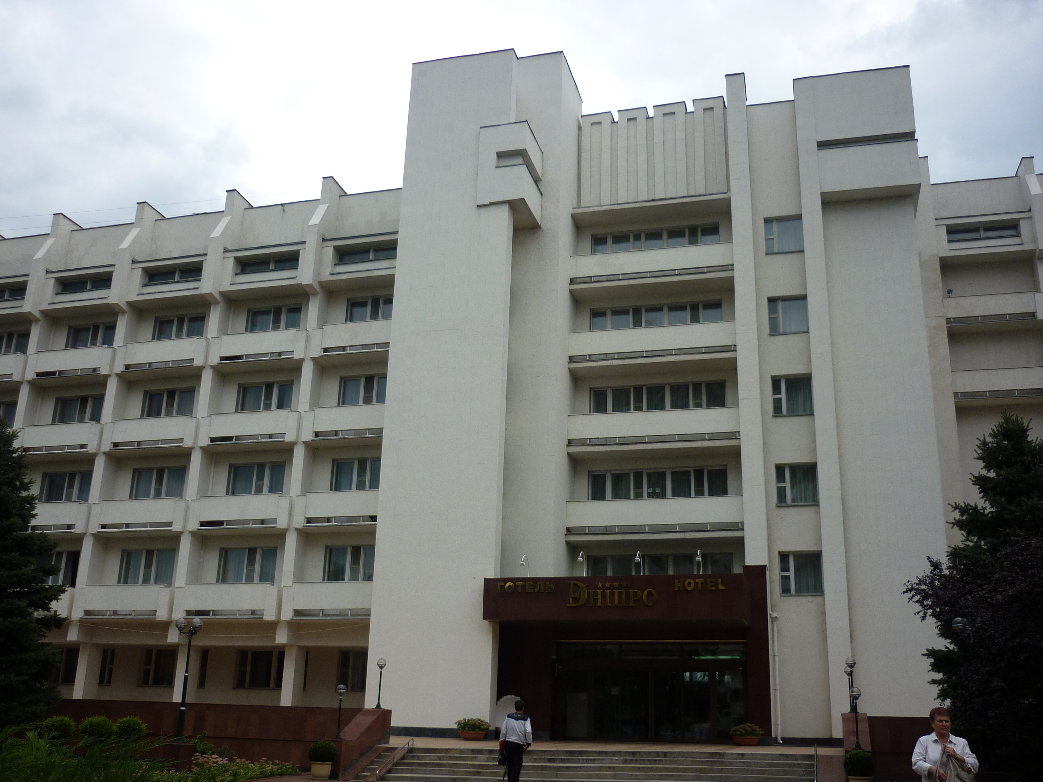 Готель "Дніпро" 4* в місті Черкаси